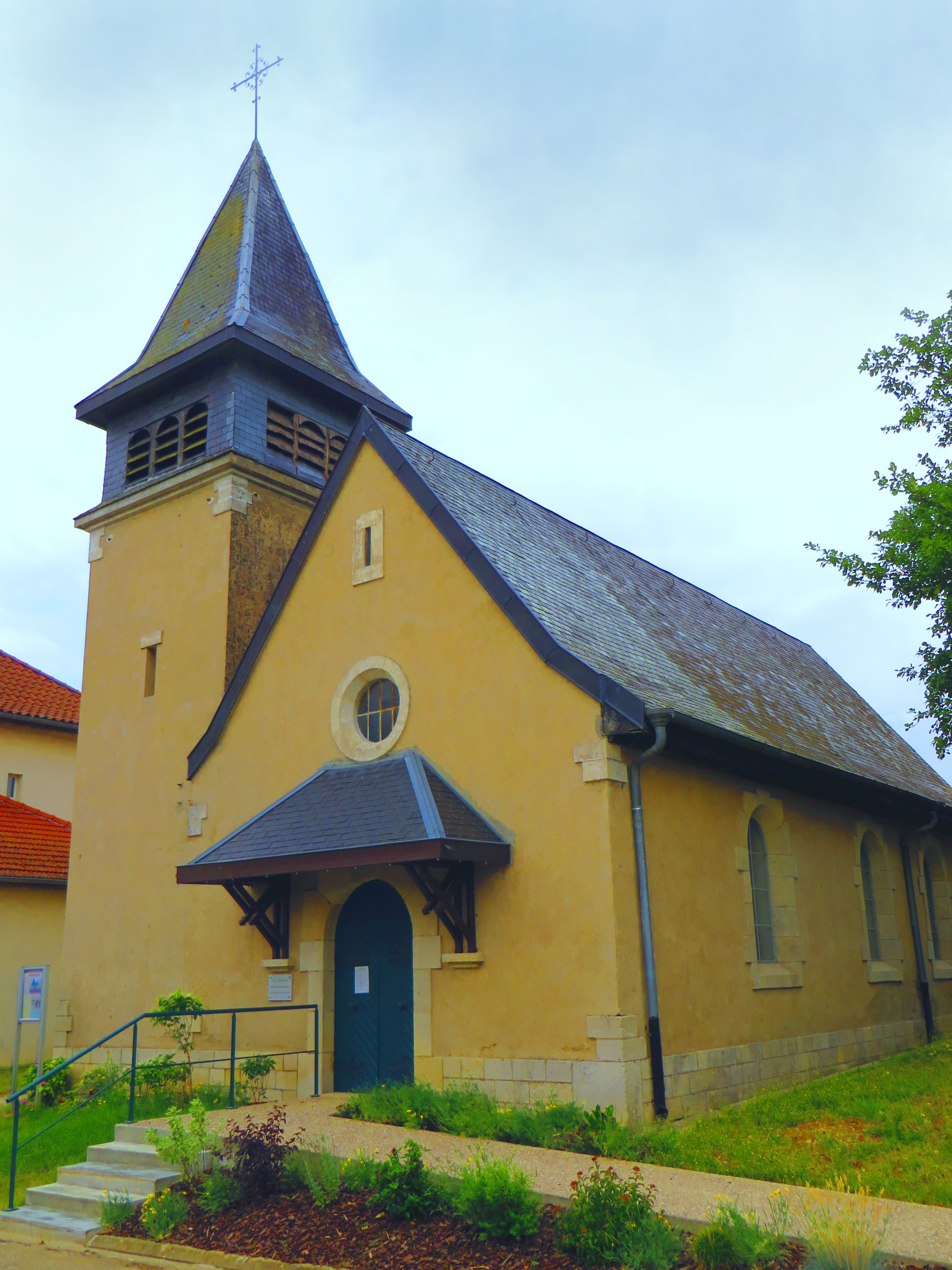 Regnéville-sur-Meuse L'église Saint-Martin